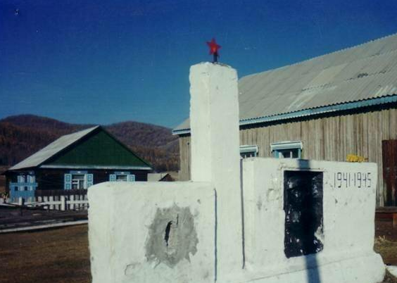 Памятник в Улентуе